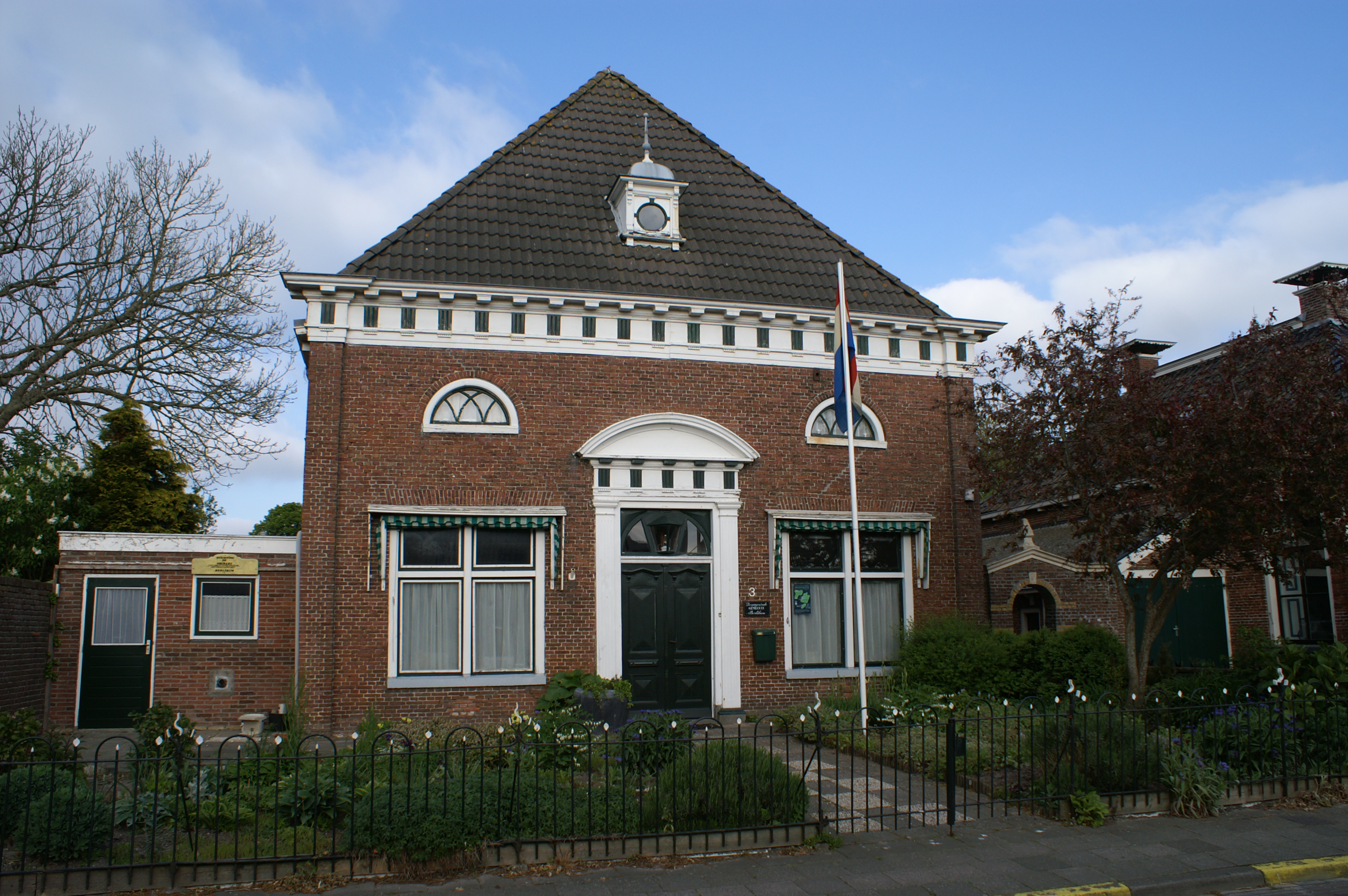 De Doopsgezinde kerk te Berlikum.